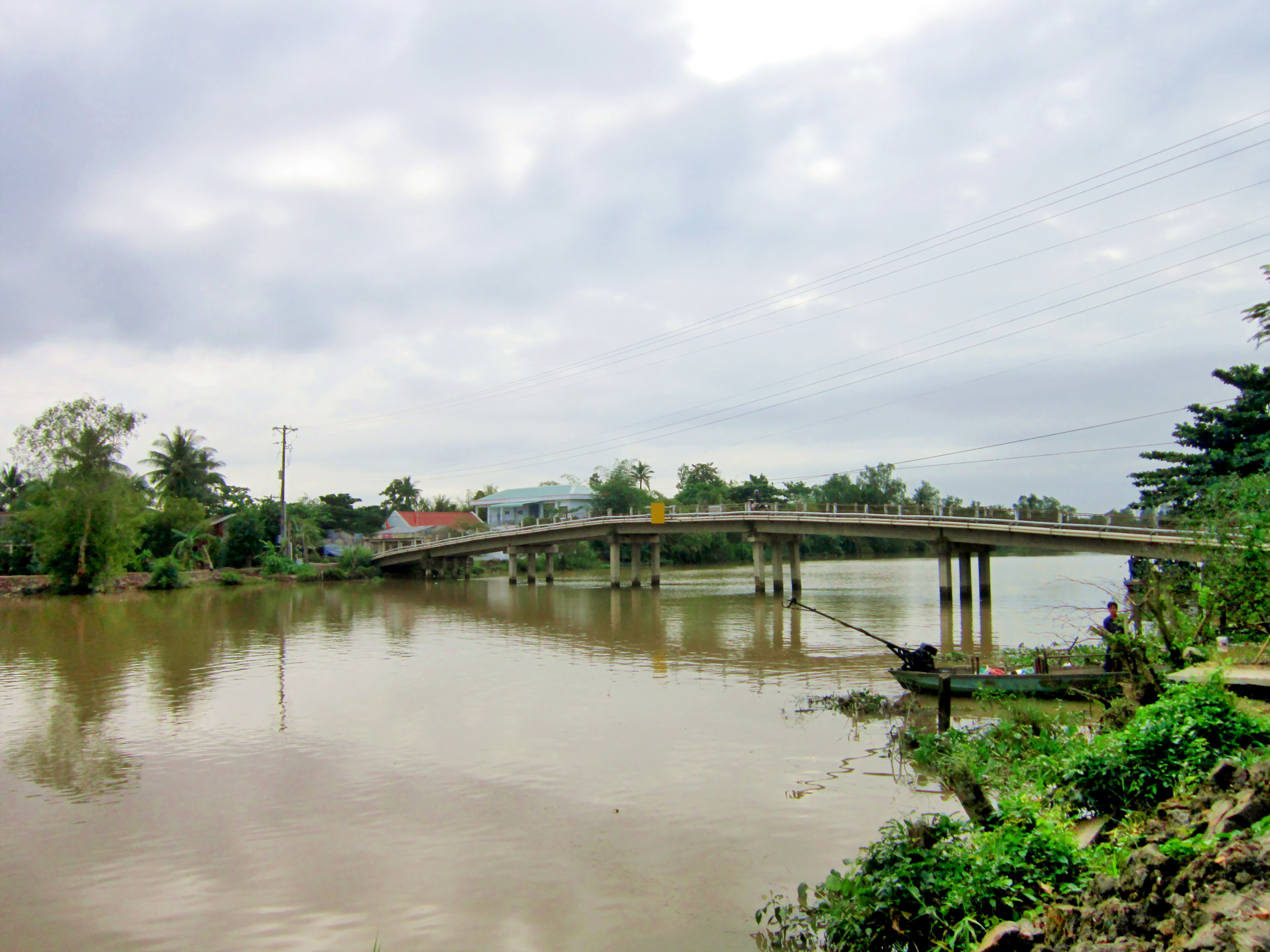 Cầu bắc qua rạch ở xã Tân Hạnh, huyện Long Hồ, tỉnh Vĩnh Long, Việt Nam.